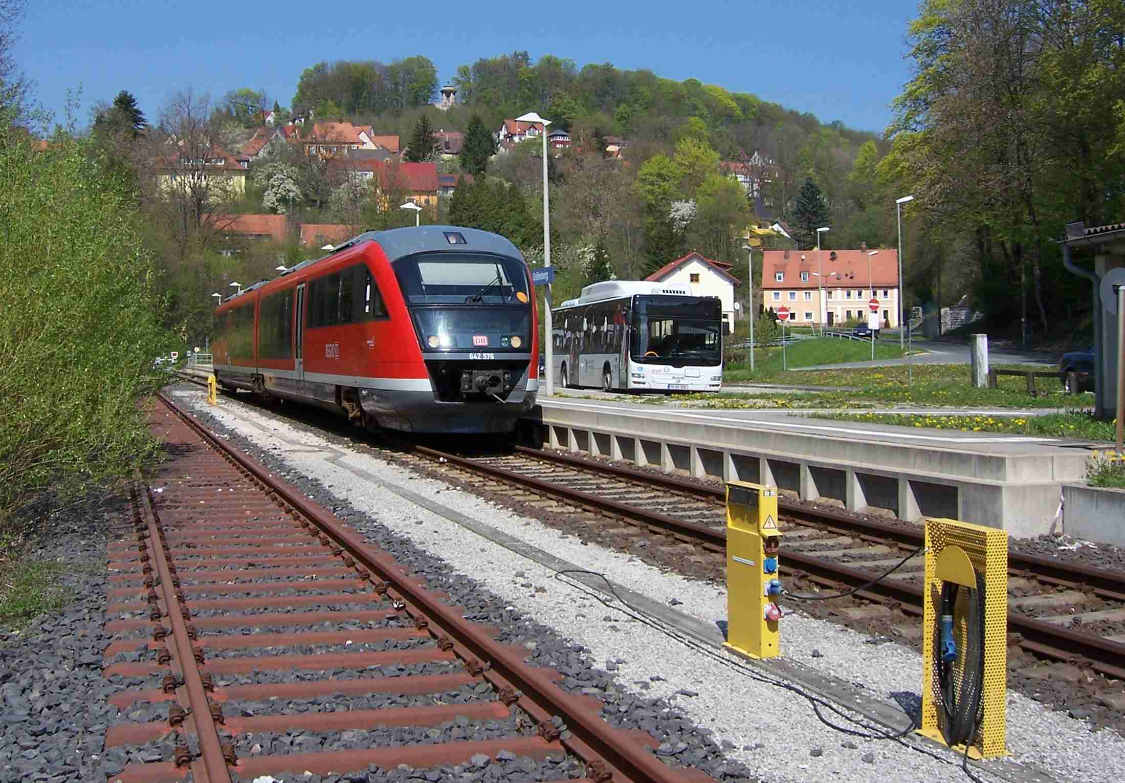 Triebwagen der Baureihe 642 im Bahnhof Gräfenberg.